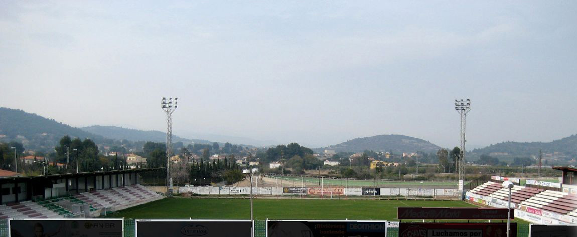 Campo del CD Onda, de Onda (Castellón)